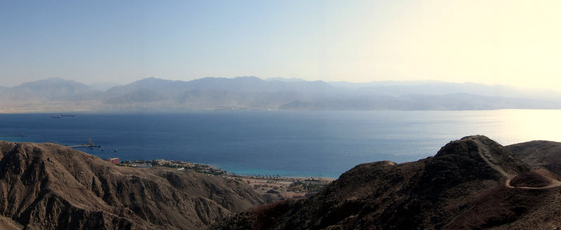 tzfahot.